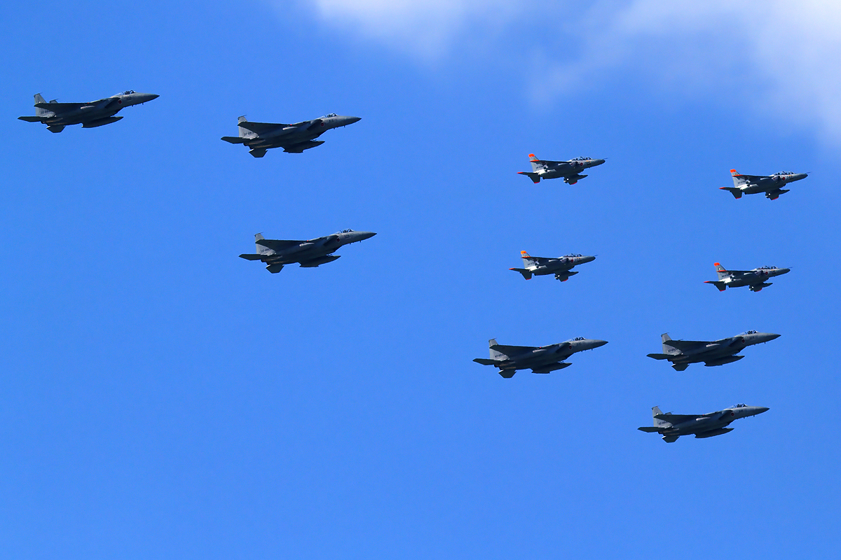 航空自衛隊那覇基地所属航空機